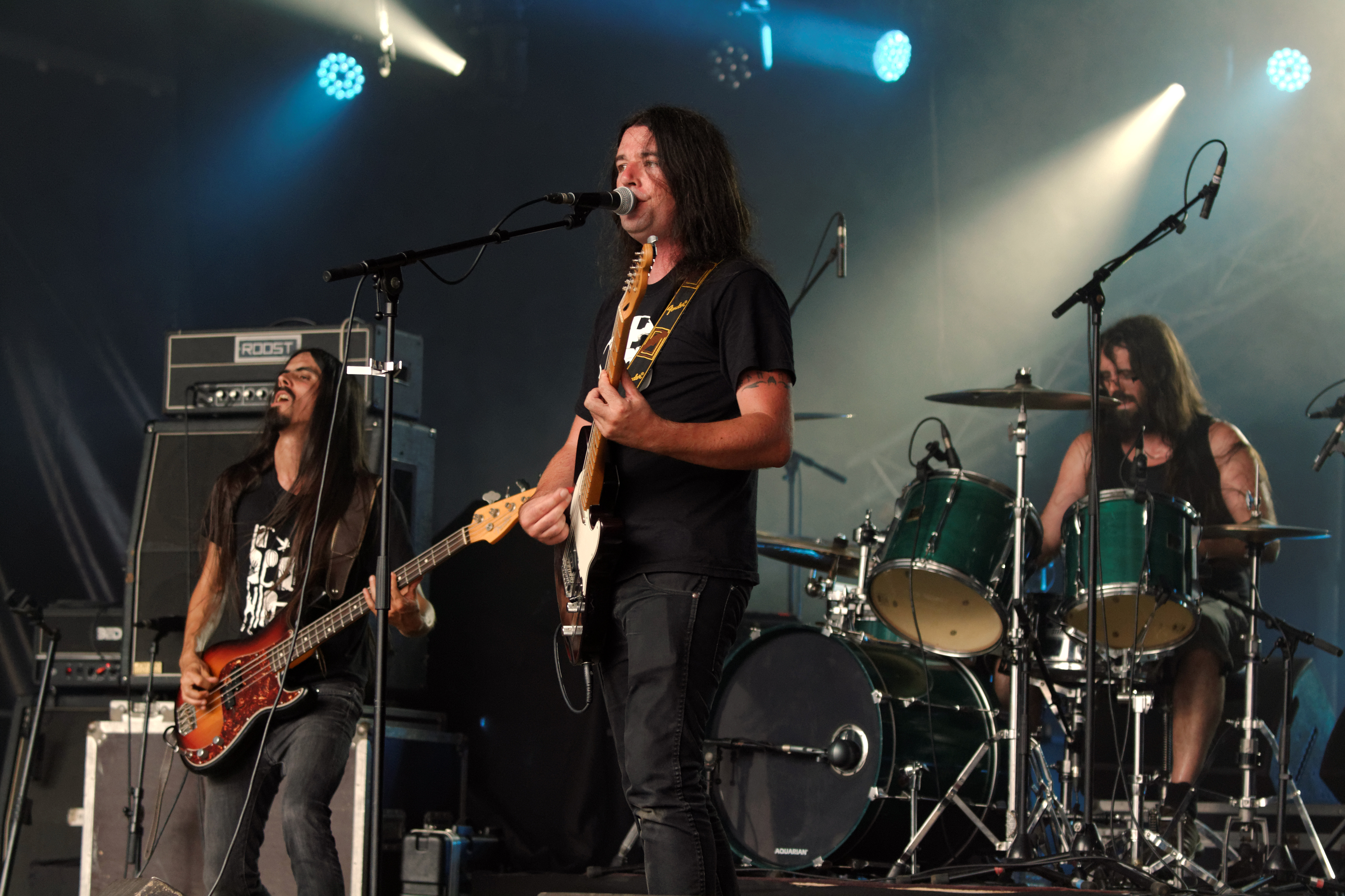 Brieg Guerveno en concert à l'espace Pierre-Jakez Hélias lors du festival de Cornouaille le 23 juillet 2014.